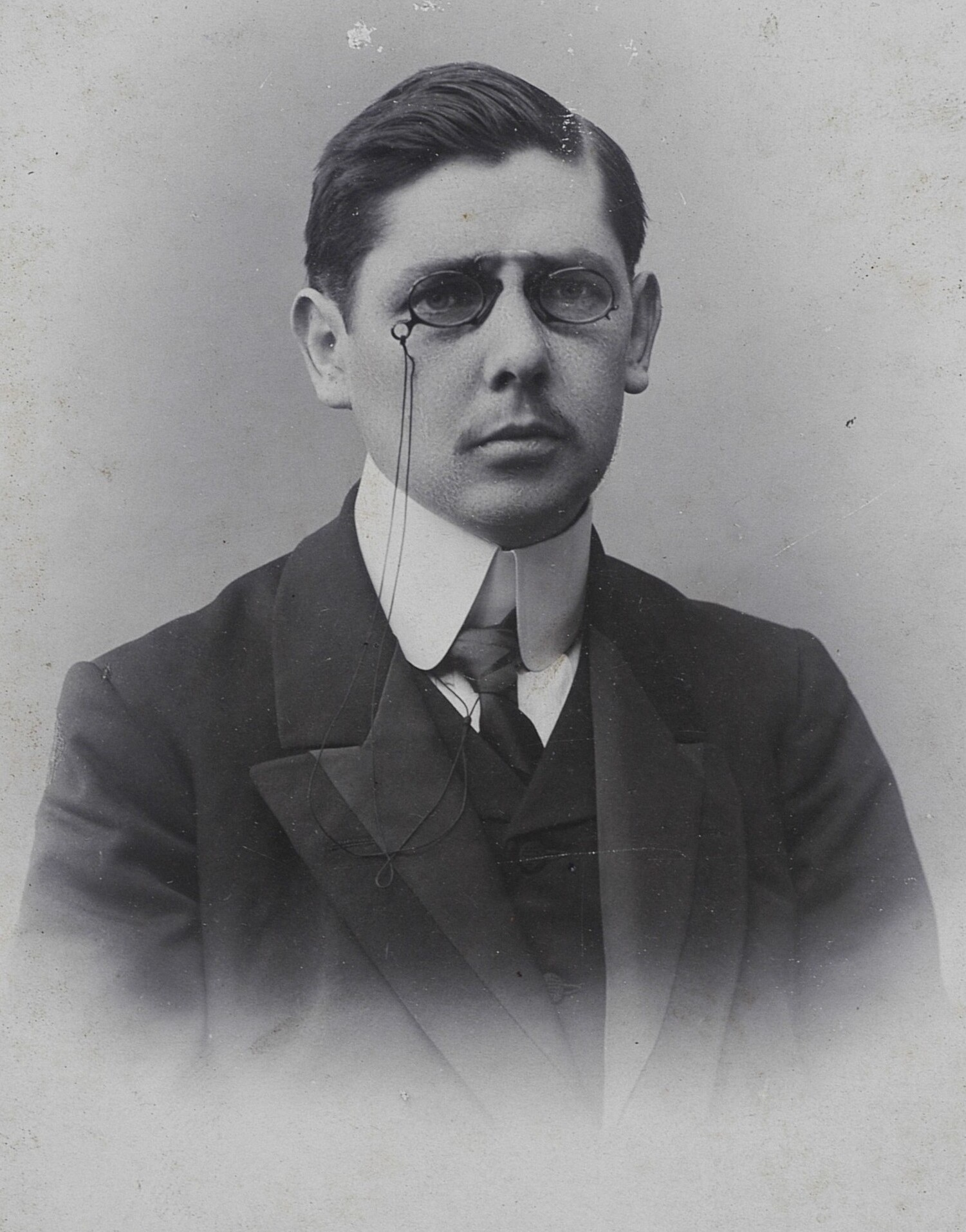 Michał Brensztejn, 1909 r.